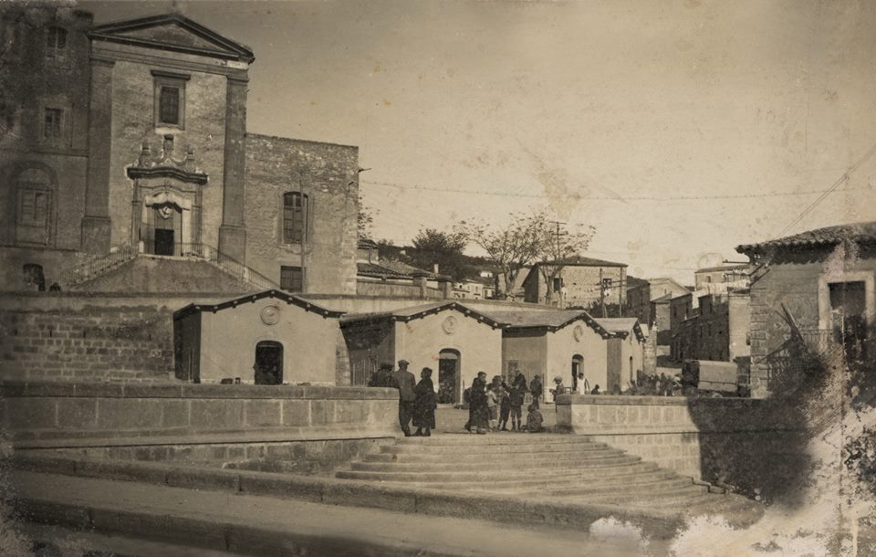 Caltanissetta - Chiesa dedicata alla Madonna della Grazia, costruita nel XVII sec. (1620) a seguito di un fatto ritenuto miracoloso, vicino alla cappelletta eretta, sul luogo del miracolo, accanto alla torre dei Piazzi. Nell’immagine (foto Telaro 1930) si vedono la chiesa con le scala a doppia rampa, il bastione del muro di contenimento della strada, oggi via M. Calafato, si vede anche il parapetto in muratura sul bastione, demolito per allargare il marciapiede e sostituito da ringhiera in ferro; si vedono anche, addossati al muro, i padiglioni del mercato Generale realizzati sullo piano ricavato dalla chiusura del torrente Grazia, costruito al livello del ponte Grazia, in primo piano la scala di collegamento tra i due livelli e la via Consultore Benintende (già Aquila Nera in gergo popolare "àcula nigura") e il Canalicchio.